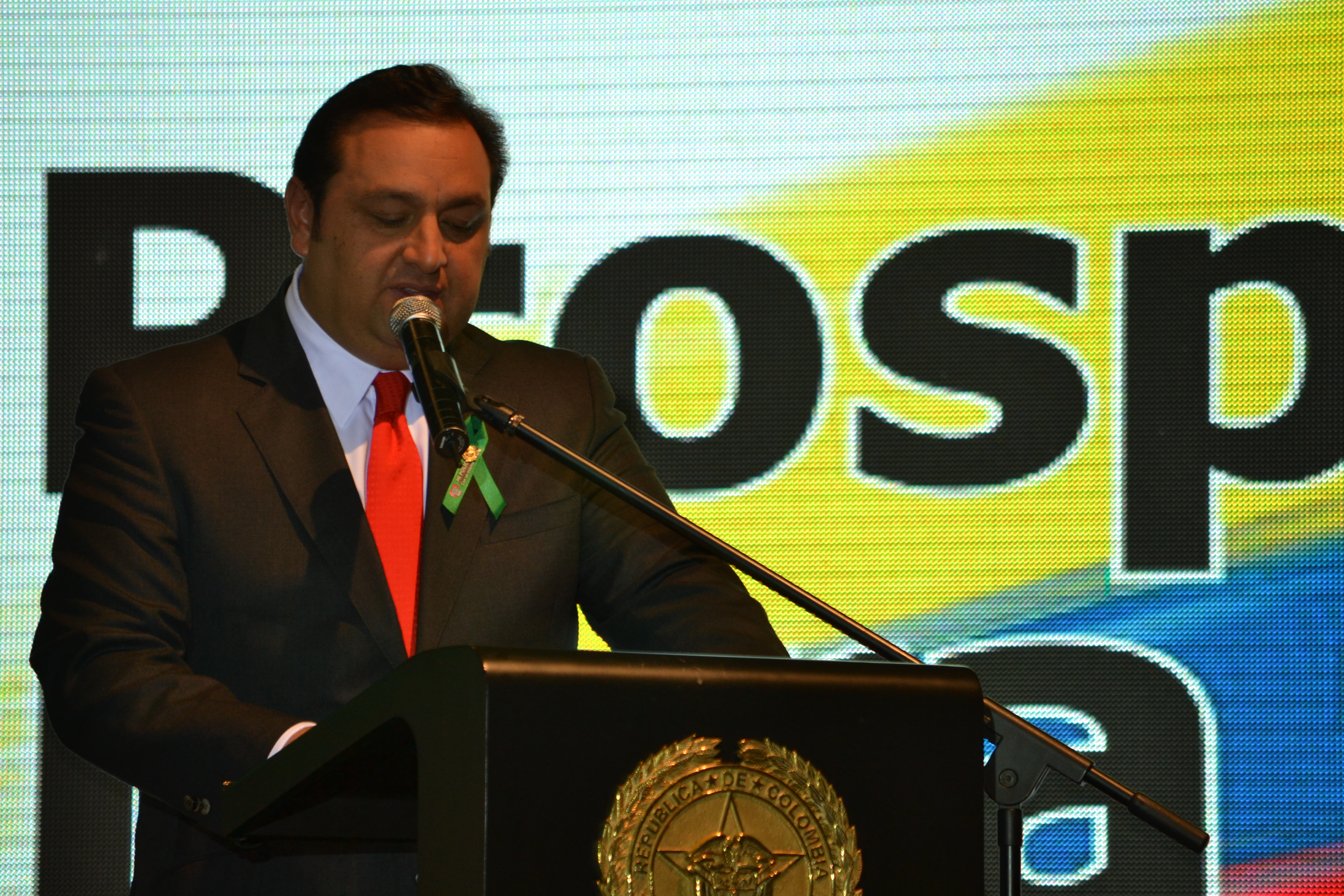 Plan Integral Policial para la Seguridad del Ciudadano “Corazón Verde”